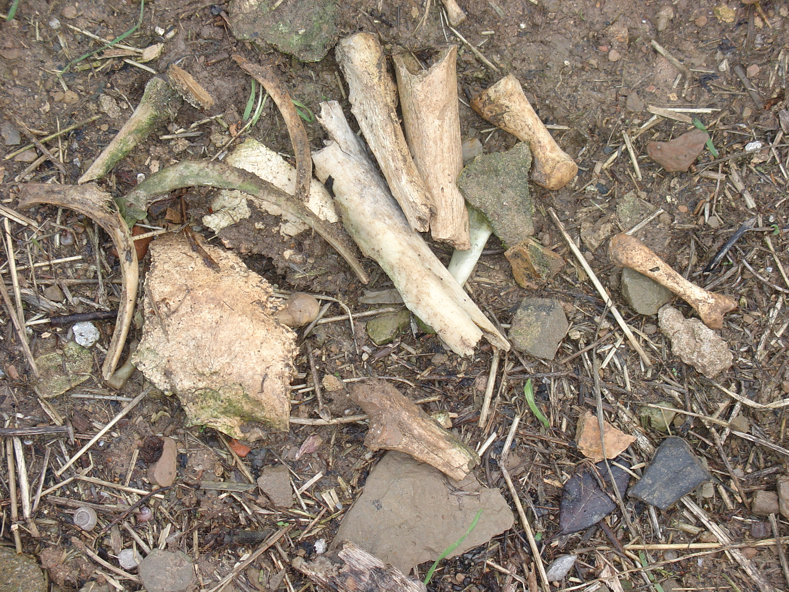 Bones